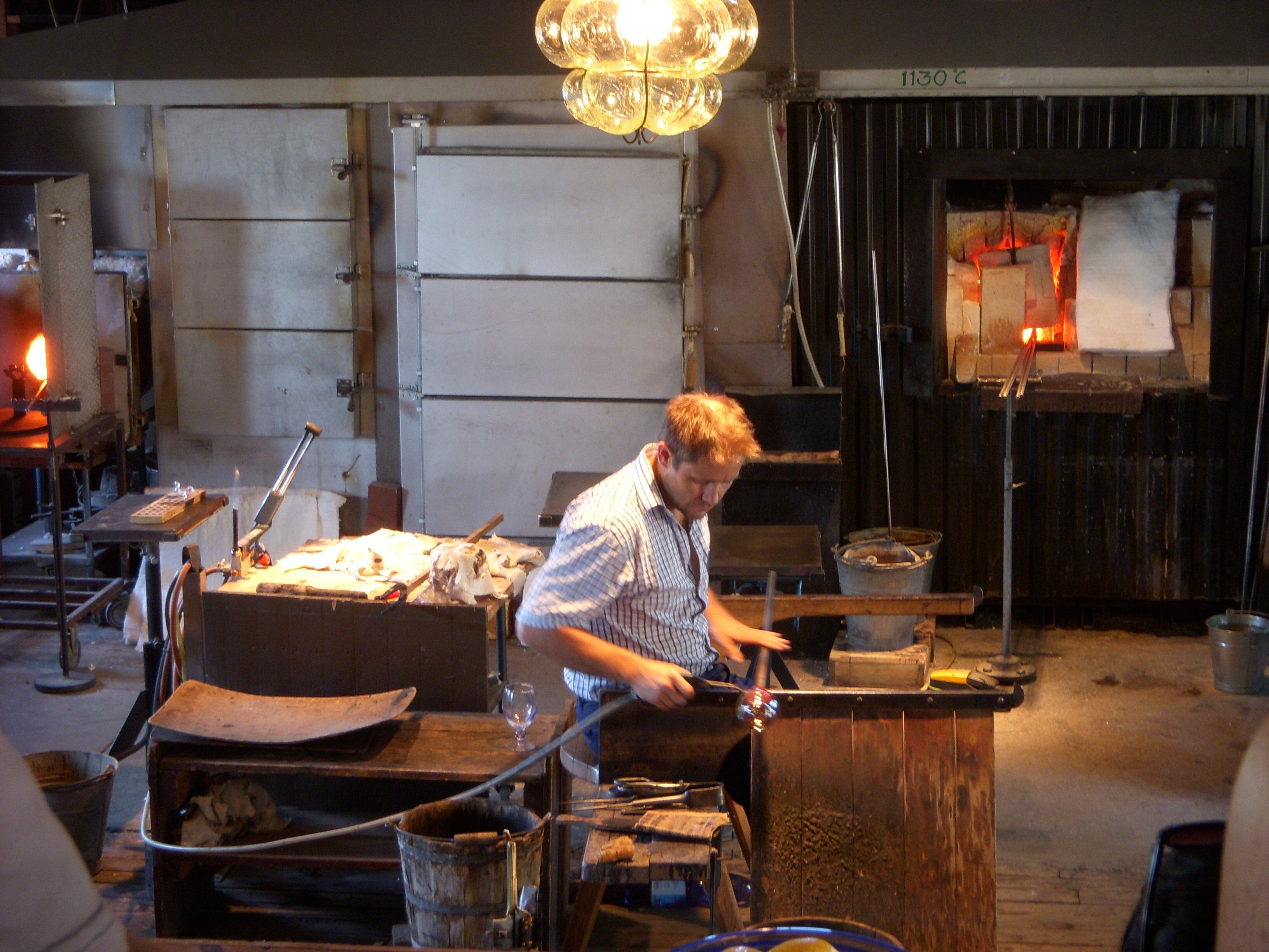 Stockholms glasbruk på Skansen